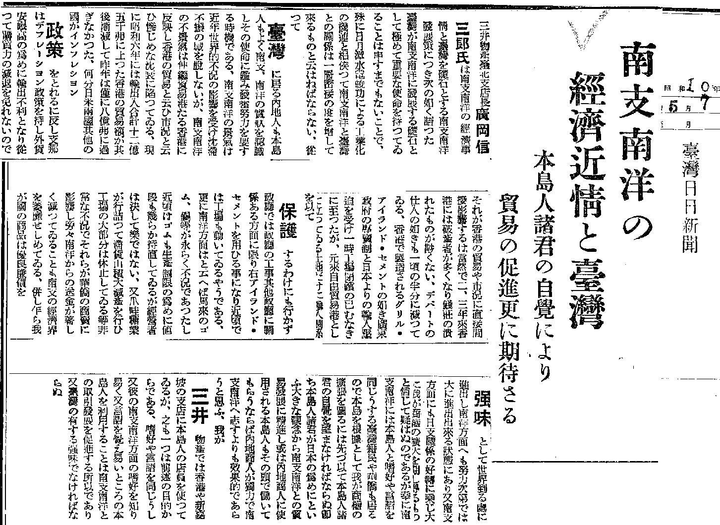 中文（台灣）: 1935.5.7